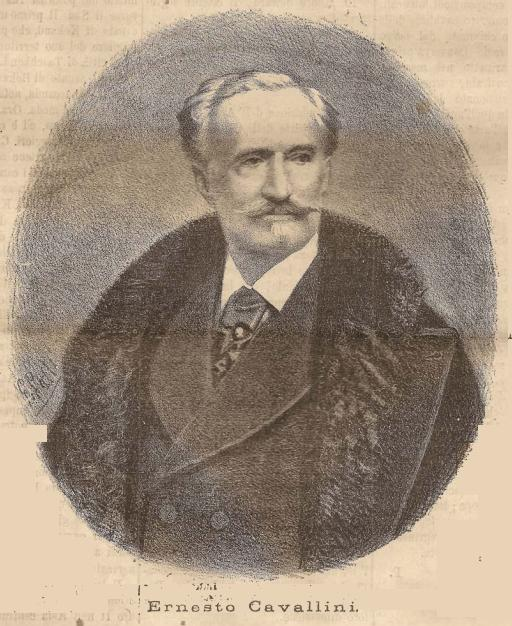 Фотография Эрнесто Каваллини